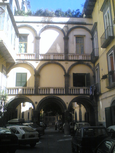 Palazzo dei Duchi di Casamassima:Cortile (Napoli)